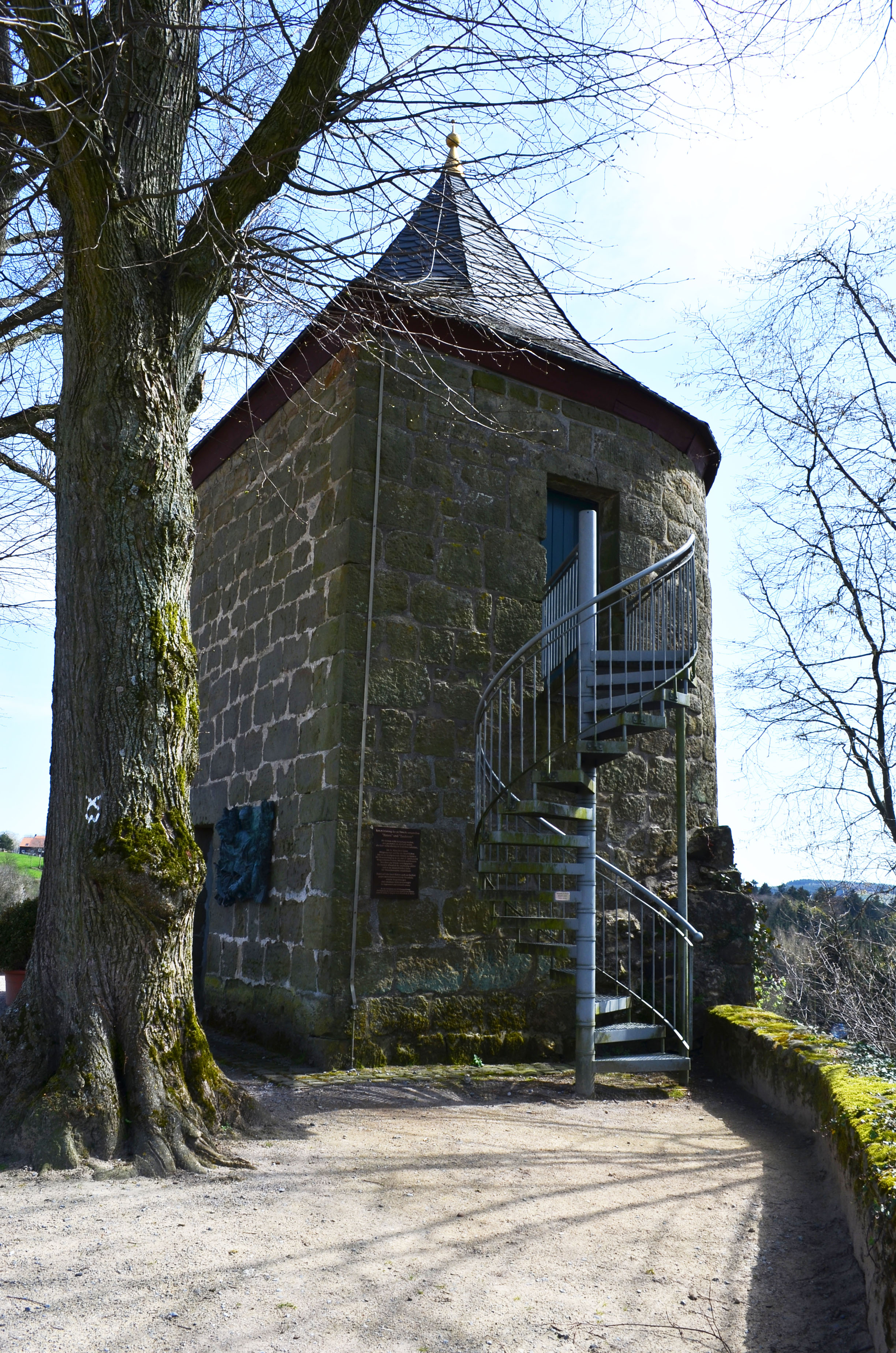 Rüthen Denkmal Hexenturm Seitenansicht , Teil der alten Stadtbefestigung